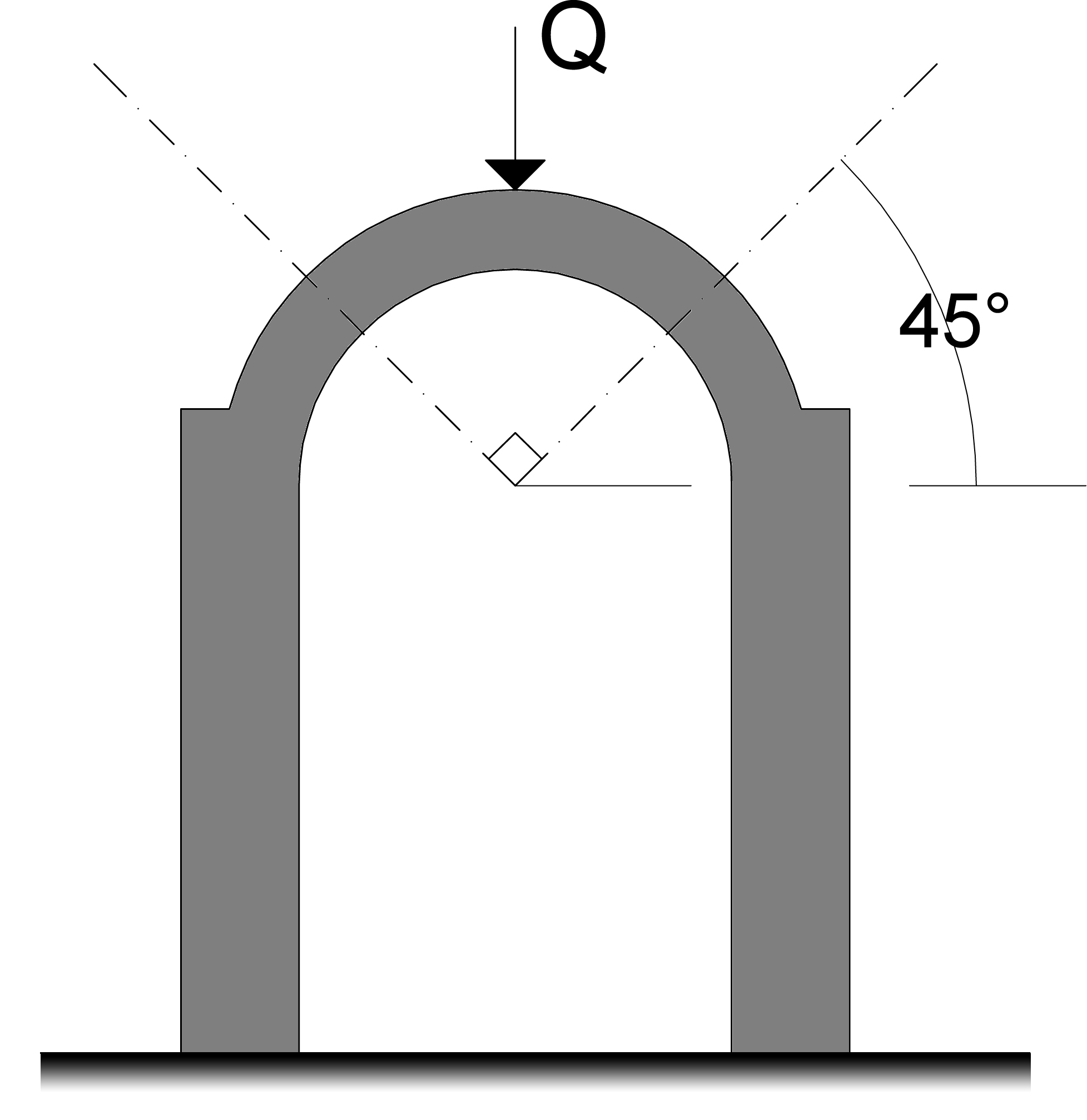 Arco sezionato a 45° secondo De Belidor e De La Hire